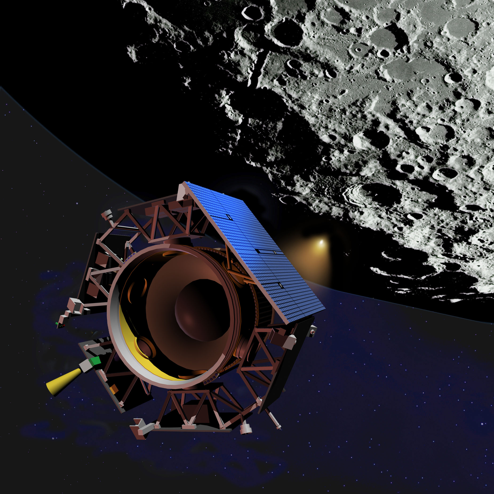 LCROSS spacecraft